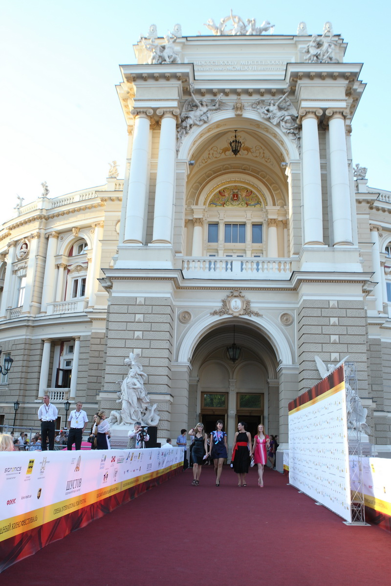 Одесский международный кинофестиваль: Одесская опера